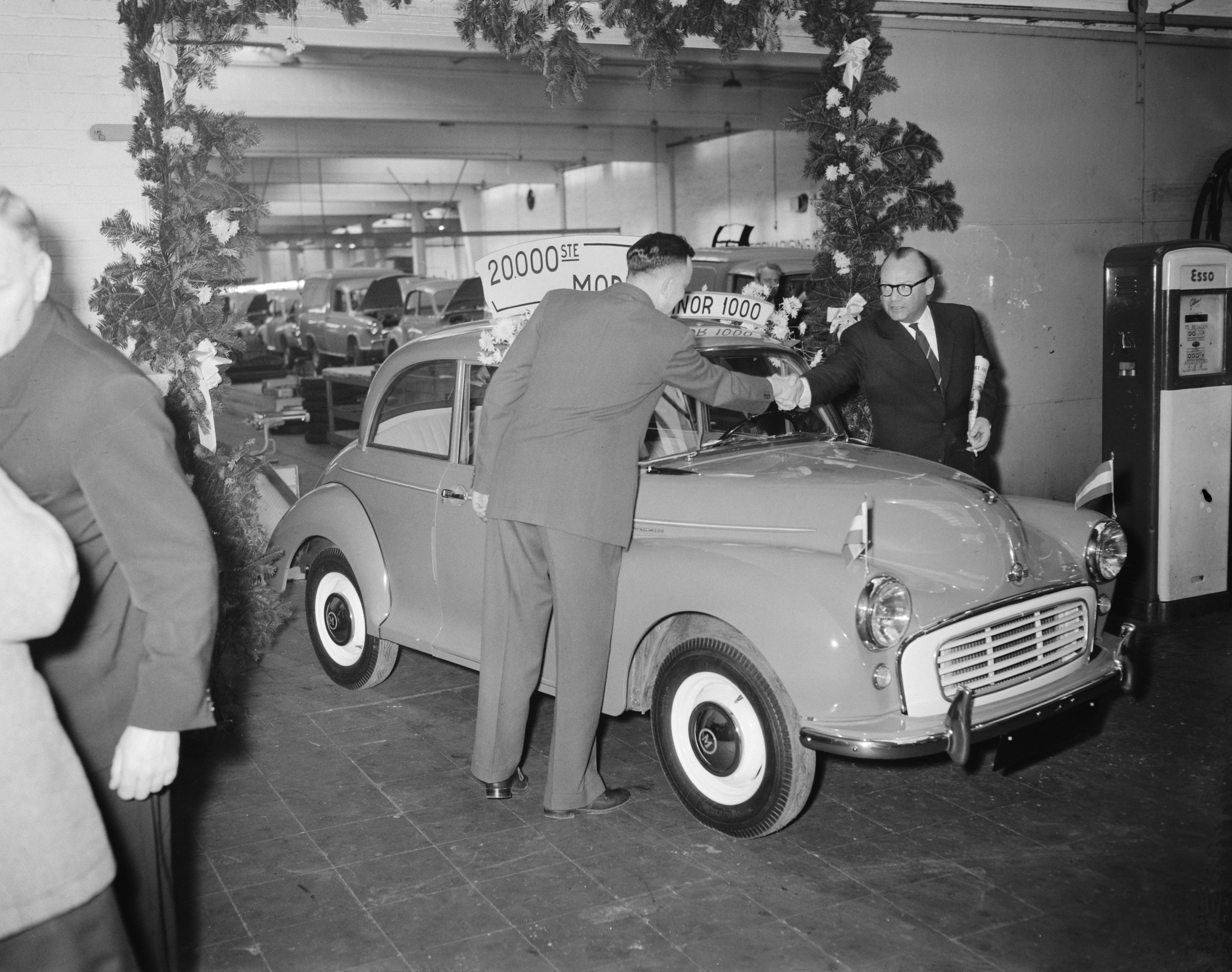 Collectie / Archief : Fotocollectie Anefo Reportage / Serie : [ onbekend ] Beschrijving : 20.000ste Morris Minor 1000 loopt van de band bij Molenaars autofabrieken te Amersfoort Datum : 28 januari 1958 Locatie : Amersfoort Trefwoorden : auto's', fabrieken Persoonsnaam : Morris Minor Instellingsnaam : Molenaars Autofabrieken Fotograaf : Bilsen, Joop van / Anefo Auteursrechthebbende : Nationaal Archief Materiaalsoort : Negatief (zwart/wit) Nummer archiefinventaris : bekijk toegang 2.24.01.04 Bestanddeelnummer : 909-2909